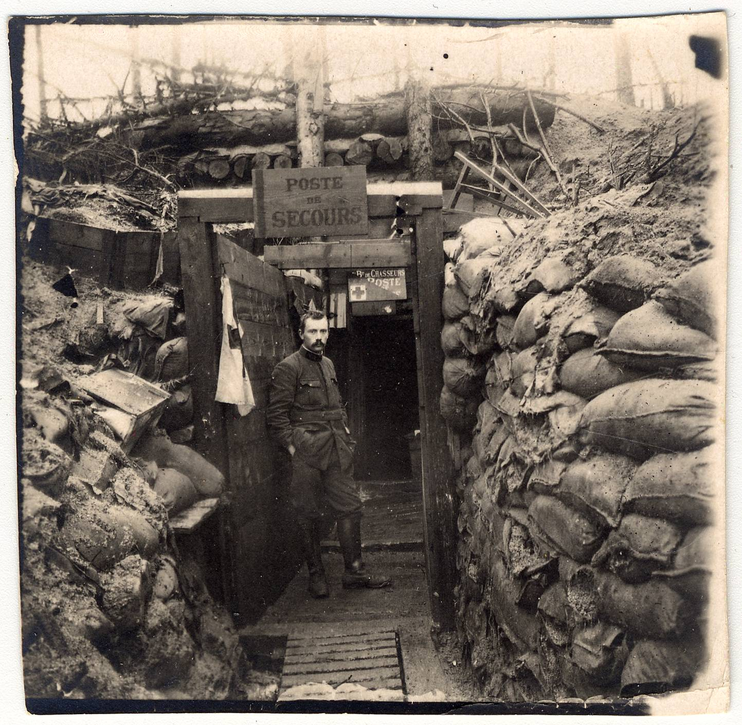 Officier posant devant un poste de secours camp des Dames près de Craonne (Aisne). Entre 1914 et 1918. Guerre 1914-1918.